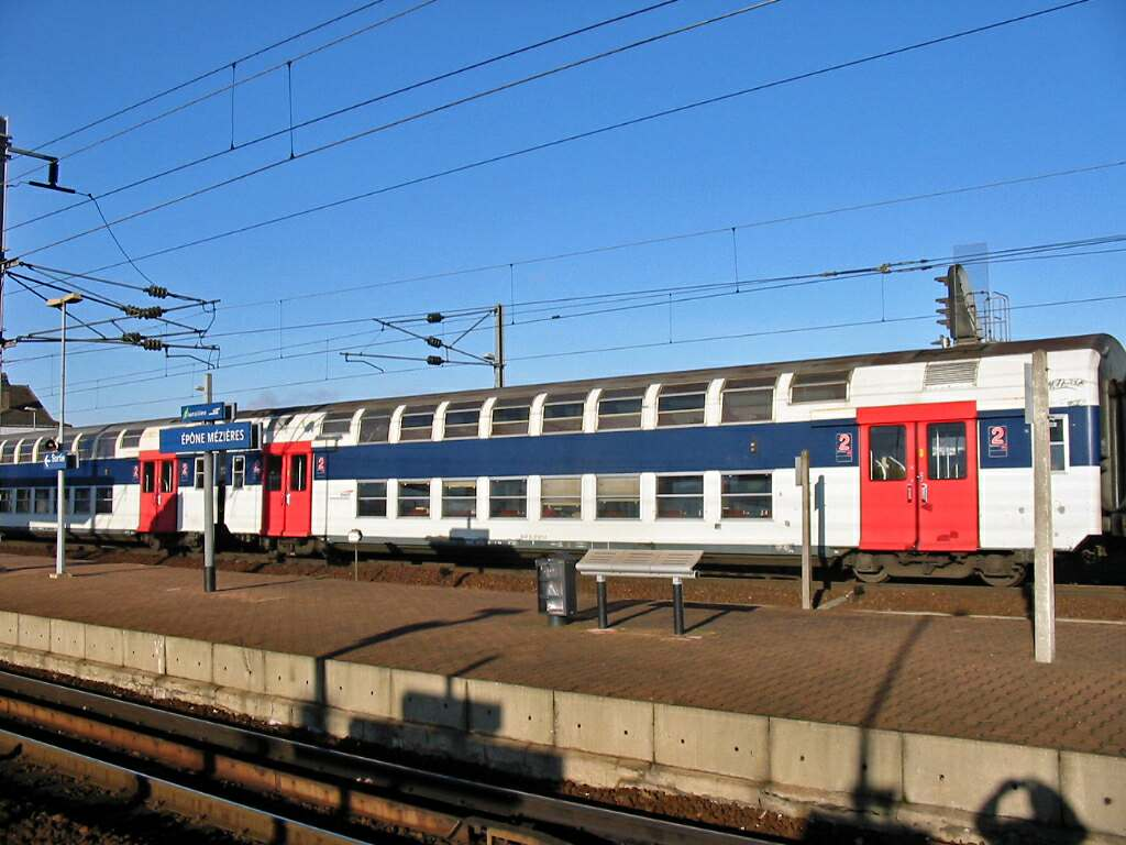 Train transilien en gare d'Épône-Mézières (banlieue Saint-Lazare) Photo JH Mora, janvier 2005